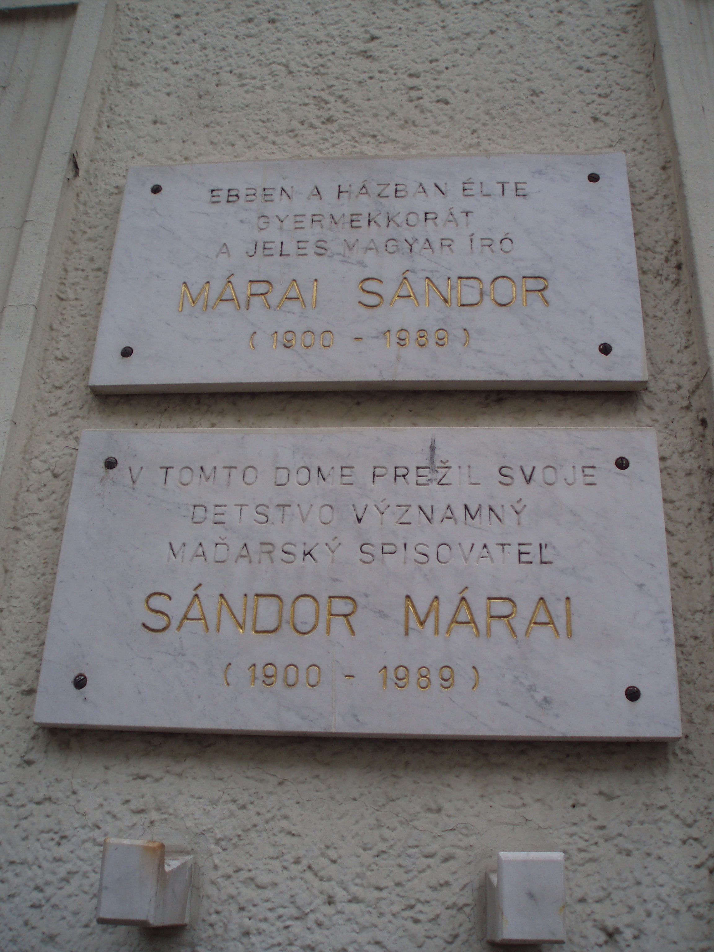 A kassai Mészáros utca 35. sz. alatt ház oldalán található emléktábla